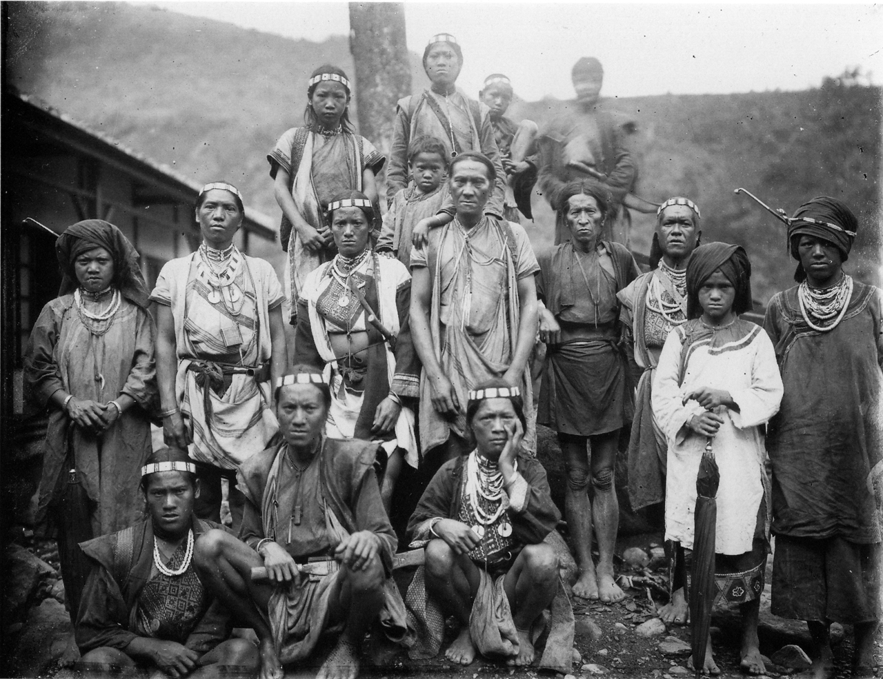 中文（台灣）: 鳥居龍藏所攝著正裝的布農族人